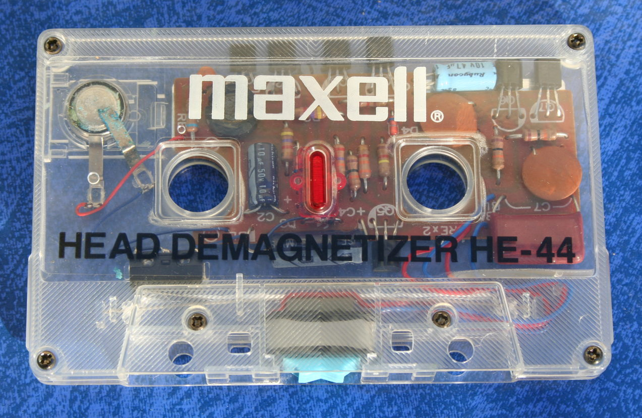 Entmagnetisierungs-Cassette